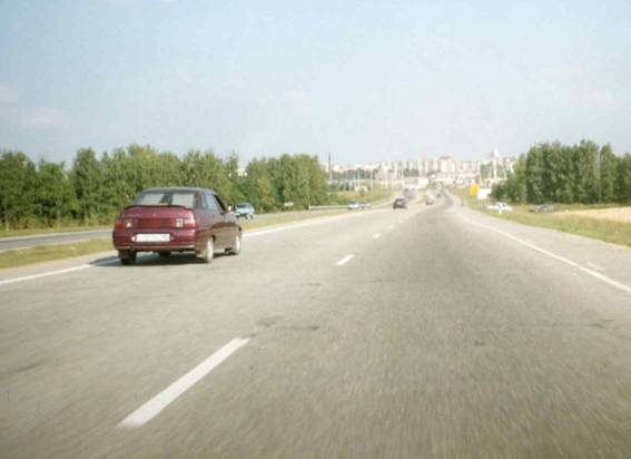 Липецкая область, Елецкое шоссе